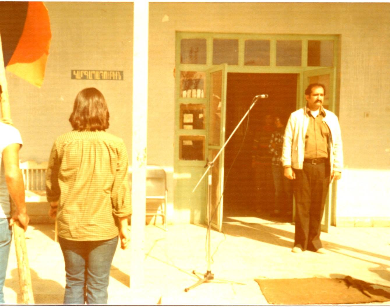 Խաժակ Տեր Գրիգորյան4